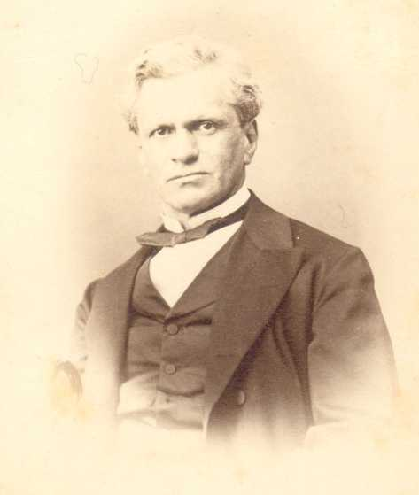 Antonio Varas de la Barra (*Cauquenes, Chile, 13 de junio de 1817 - Santiago de Chile, 3 de junio de 1886), político y ministro de Estado chileno, uno de los más importantes del siglo XIX.